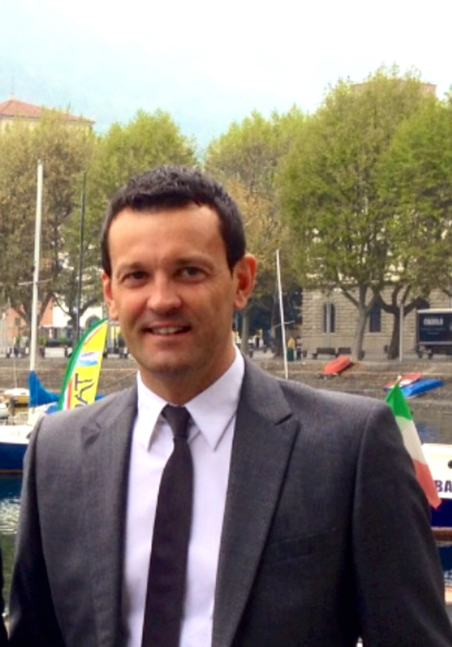 Cedric Vasseur